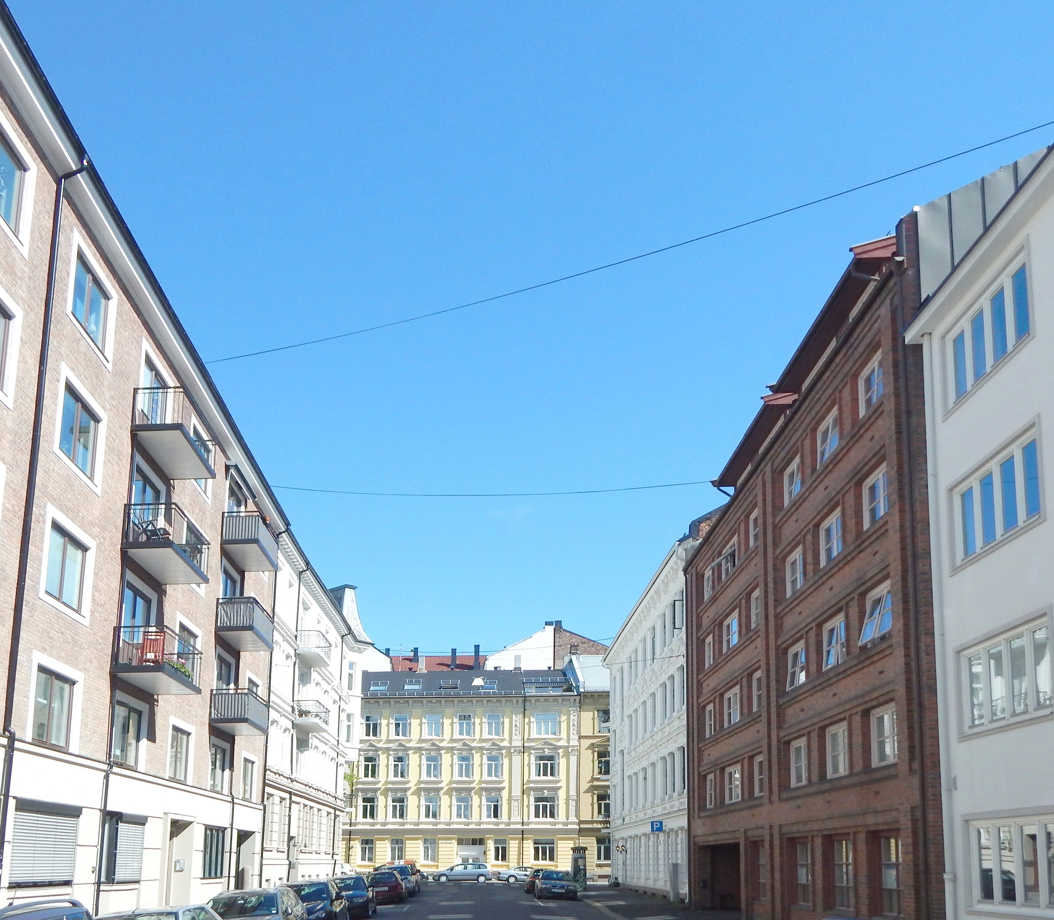 Henrichsens gate mot Frydenlundgata